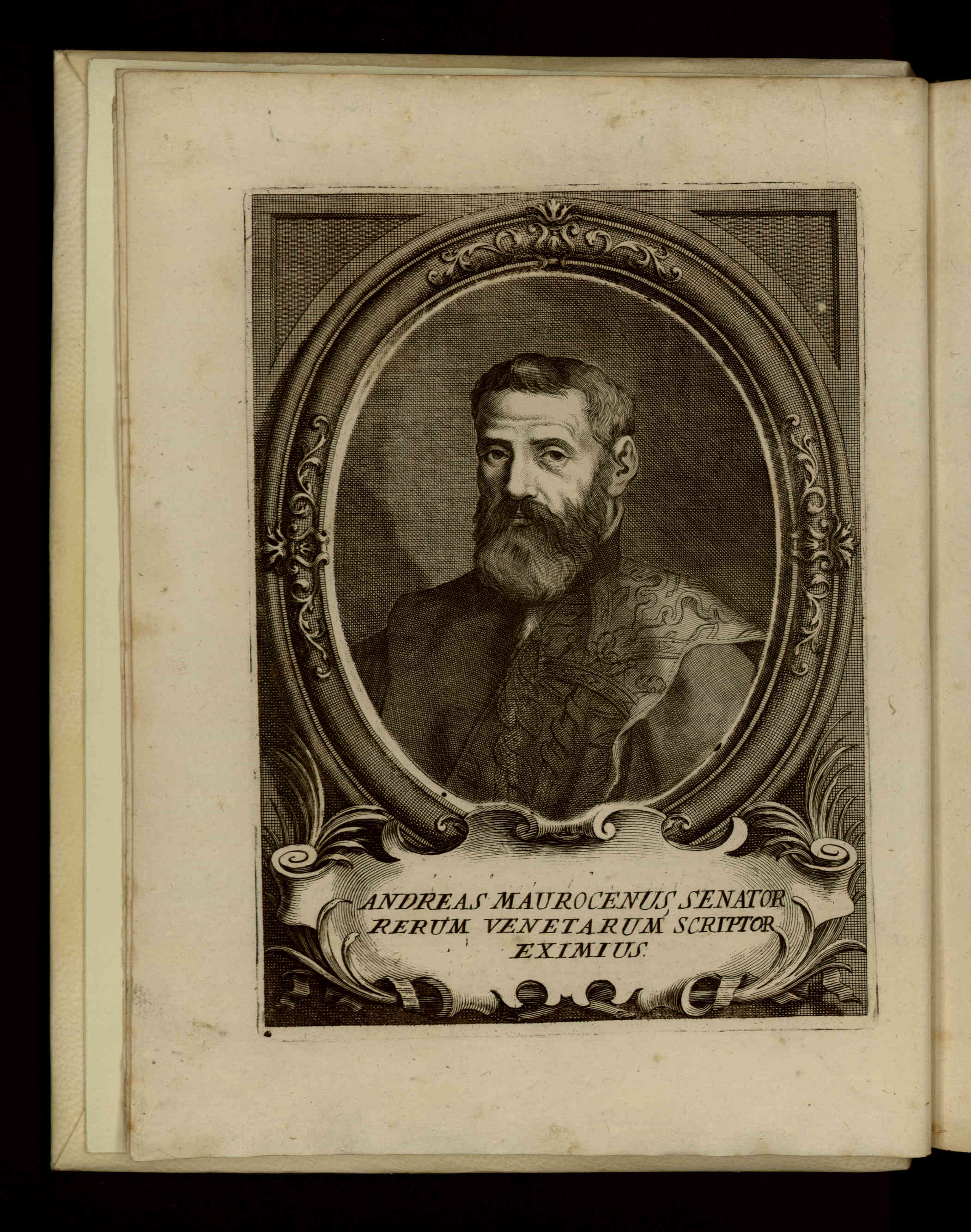 Ritratto dell'autore